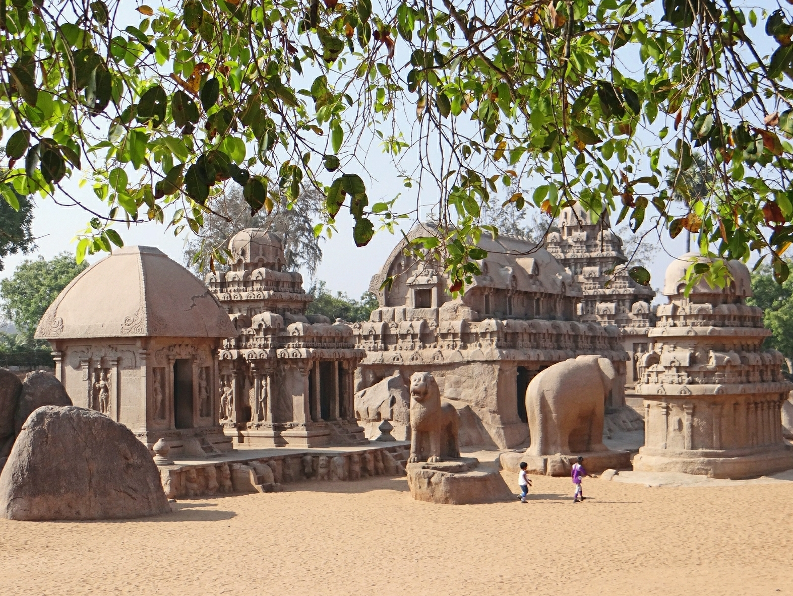 Vue d'ensemble des cinq rathas (temples monolithes) de Mahabalipuram Ces cinq temples monolithes, appelés rathas (chariots), ont été sculptés sous le règne de Narasimhavarman (630-670), de la dynastie des Pallavas à Mahabalipuram en Inde du sud. Un ratha est un chariot en bois destiné à transporter le dieu lors d'une procession, il prend la forme d'un petit temple doté de roues, c'est par analogie que ces temples monolithes ont reçu ce nom bien qu'ils n'aient pas de roues. Ils reproduisent à l'identique dans le rocher les morphologies des temples construits à l'époque dans des matériaux non pérennes et qui ont tous disparus. Cette caractéristique en fait un site essentiel pour comprendre l'évolution de l'architecture dravidienne. Deux temples sont de forme pyramidale sur une base carrée (Arjuna et surtout le Dharmaraja), c'est cette morphologie qui a été retenue dans l'architecture dravidienne ultérieure car elle évoque le mont Meru, la demeure des dieux et répond à la cosmologie hindoue (la cella comme centre rituel rayonnant). Le site de Mahabalipuram est classé par l'UNESCO au patrimoine mondial. A l'époque des Pallavas, la ville était un port en relation avec le Champa (royaume vaincu situé au centre et au sud de l'actuel Vietnam), Bali en Indonésie, le pays khmer (Cambodge), autant de régions qui s'étaient indianisées par le biais des échanges commerciaux. Article de Wikipedia sur Mahabalipuram